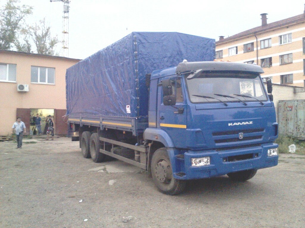 КАМАЗ-65117 А4, Тентованый, Рестайлинговое исполнение кабины, модель 2014 года, ЕВРО4.